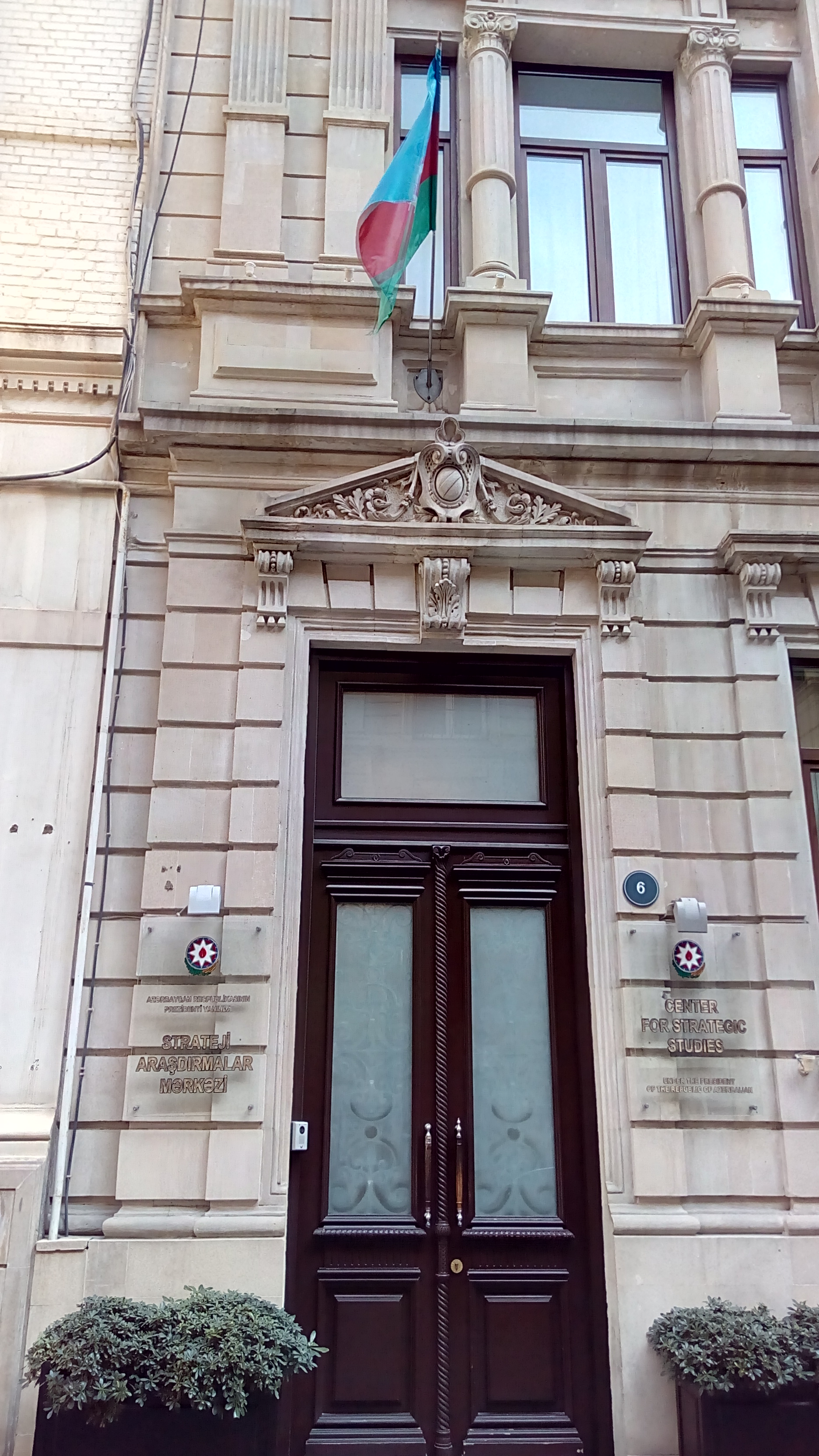 Azərbaycan Respublikasının Prezidenti yanında Strateji Araşdırmalar Mərkəzi